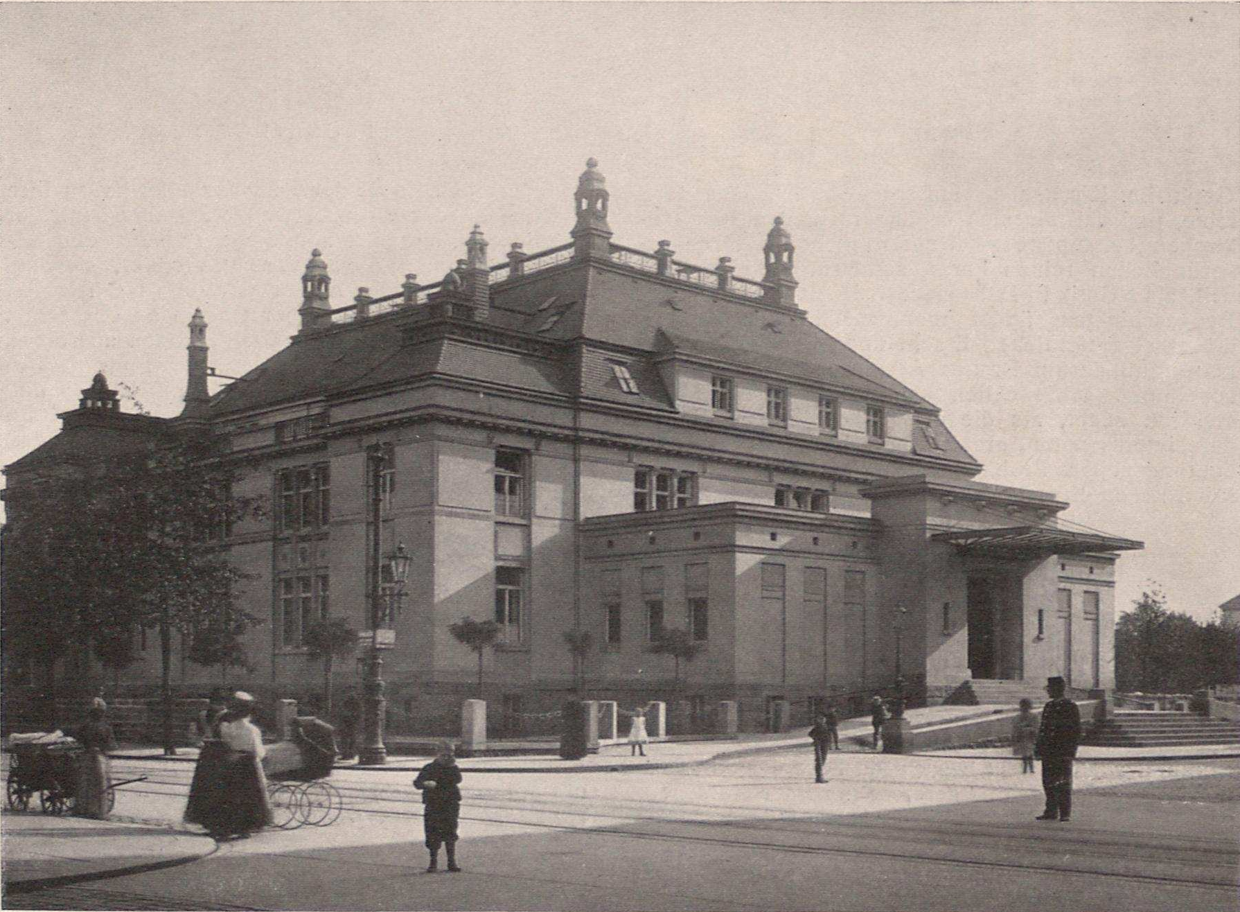 Das neu erbaute Künstlerhaus der Dresdner Kunstgenossenschaft an der Grunaer Straße 48, Ecke Albrechtstraße, in Dresden 1908.